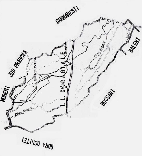 Harta comunei I. L. Caragiale. Imaginea a fost preluată de pe situl Primăriei, cu acordul administratorului (vezi: aici).